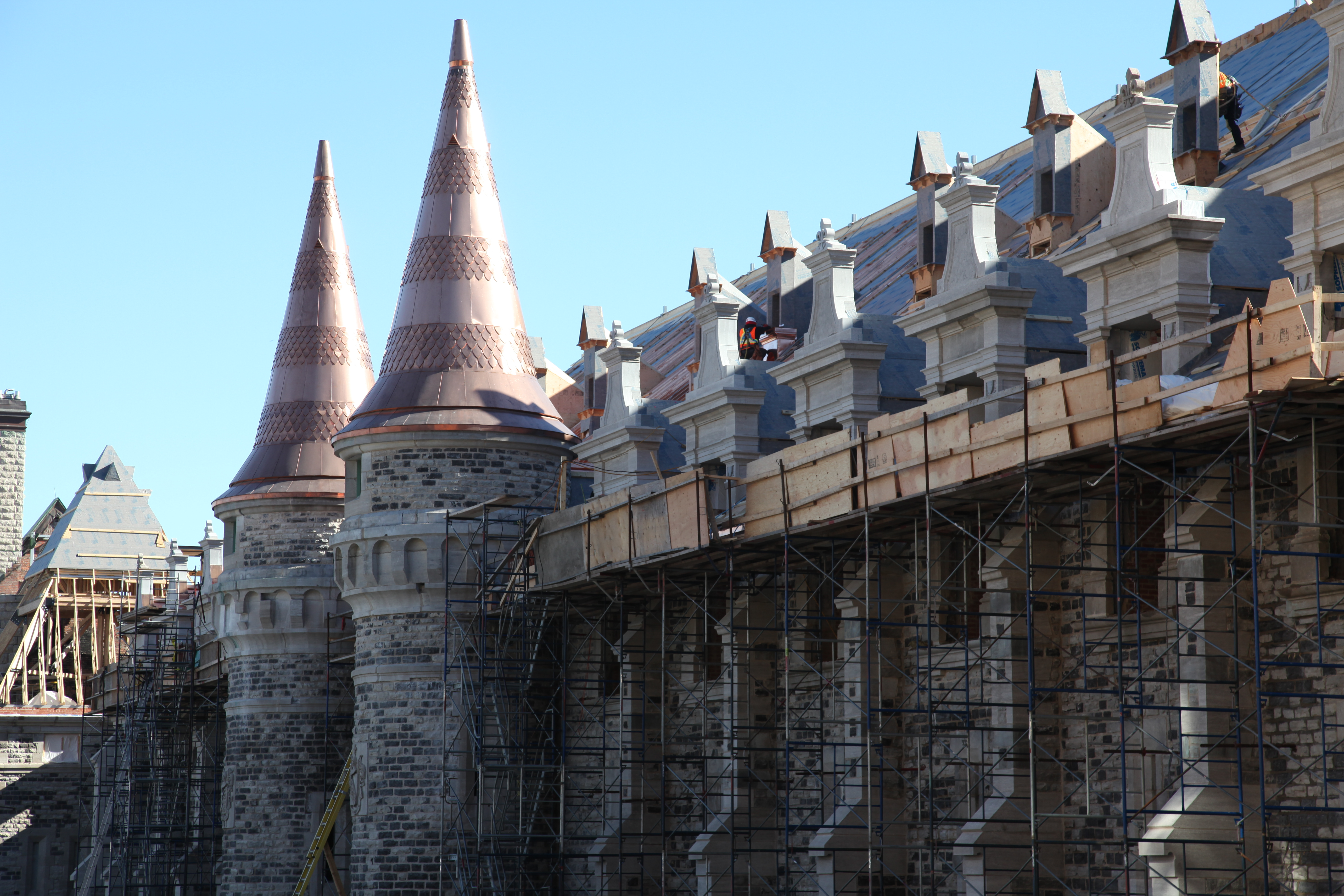 Le Manège militaire Voltigeurs de Québec est un vaste bâtiment de style château dans la Ville de Québec. Construit à partir de 1885 sur des plans de l'architecte Eugène-Étienne Taché juste à l’extérieur des murs de la vieille ville, en bordure des plaines d’Abraham, le manège domine le terrain d’exercice d’origine avec lequel il a un lien indissociable. La conception fantaisiste du bâtiment, avec son haut toit pentu, ses murs de pierre et ses tourelles à pinacle, en a fait un véritable symbole de l’architecture canadienne. Le manège est détruit par un incendie durant la nuit du 4 au 5 avril 2008. Le premier ministre Stephen Harper a annoncé le 16 novembre 2012 que le manège serait reconstruit et environ 100 millions de dollars seront investis entre 2012 et 2015 pour les travaux.